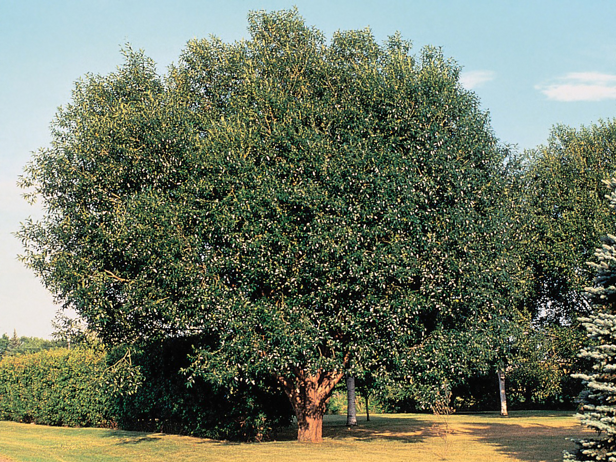 Name Salix pentandra Family Salicaceae